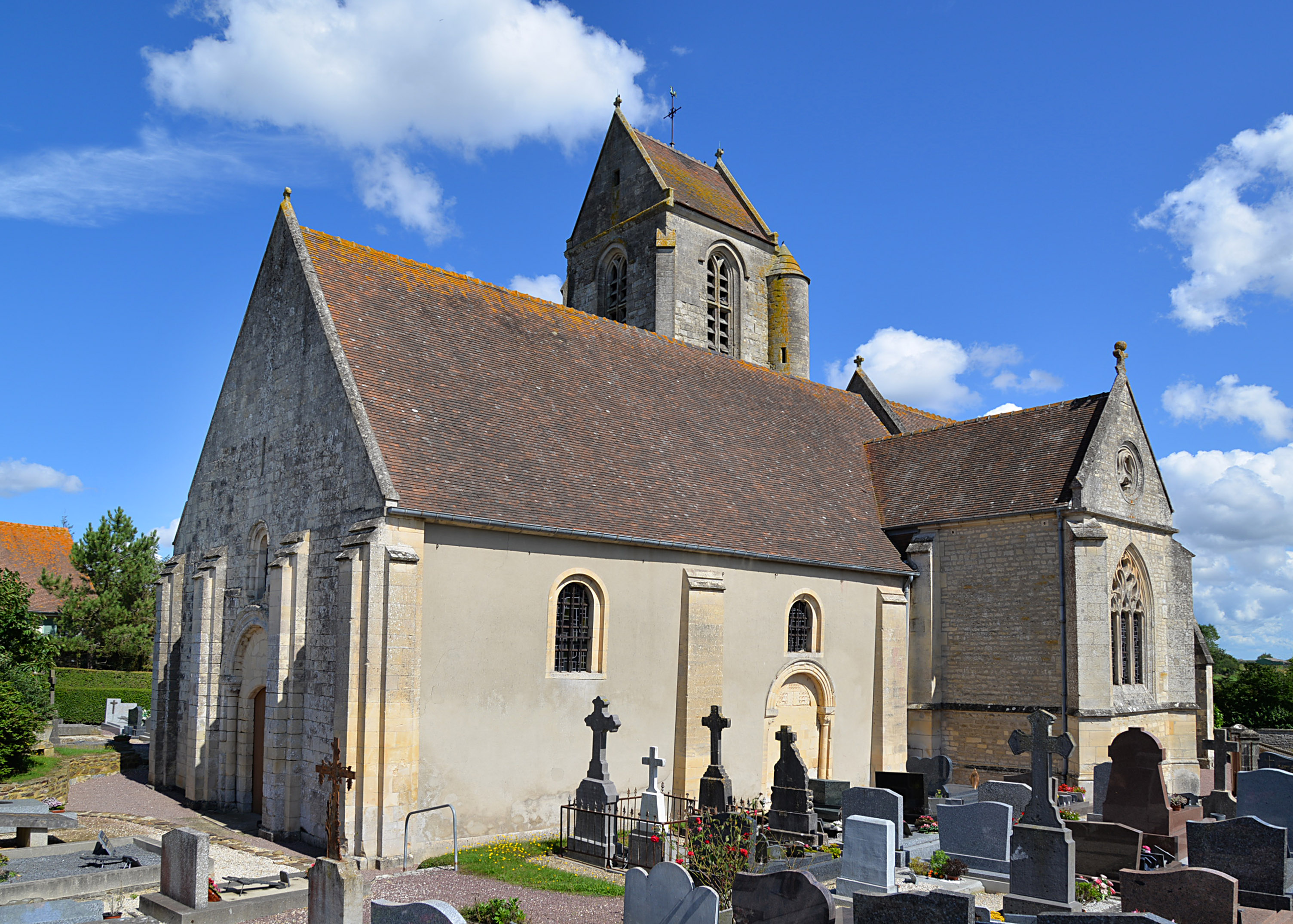 Grainville-sur-Odon (Calvados)